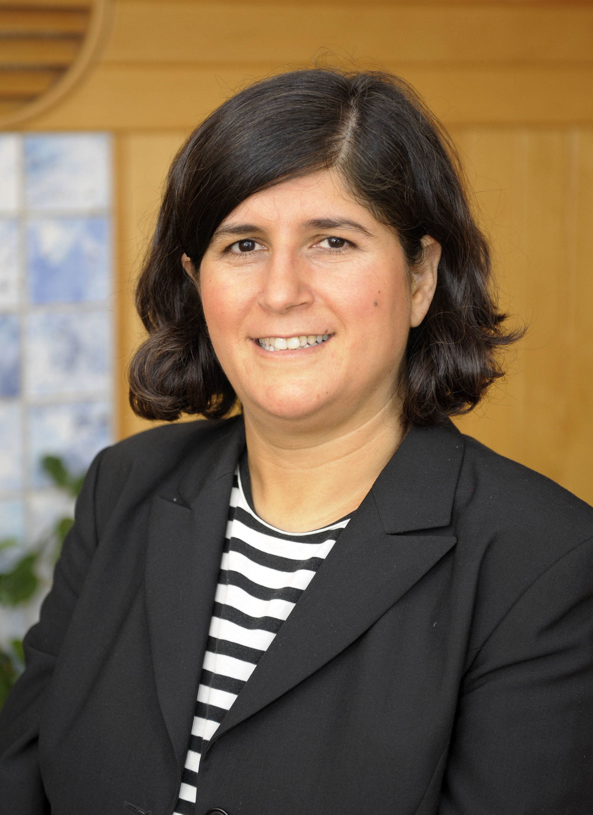 Nalin Pekgul, förbundsordförande i S-kvinnorna.